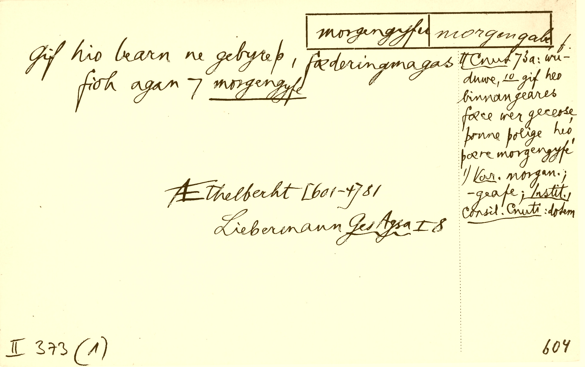 In der Anfangszeit des Deutschen Rechtswörterbuchs wurden solche Belegzettel erstellt, auf welchen das Vorkommen eines Wortes in einem historischen Rechtstext vermerkt wurde. Hier handelt es sich um einen Nachweis für das Wort "Morgengabe"